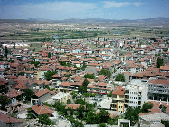 A panorama of Gülşehir in Nevşehir, Turkey.